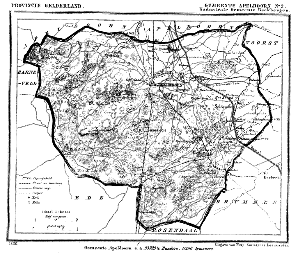 De kadastrale gemeente Beekbergen in 1866. De grenzen komen overeen met die van het voormalige kerspel Beekbergen.